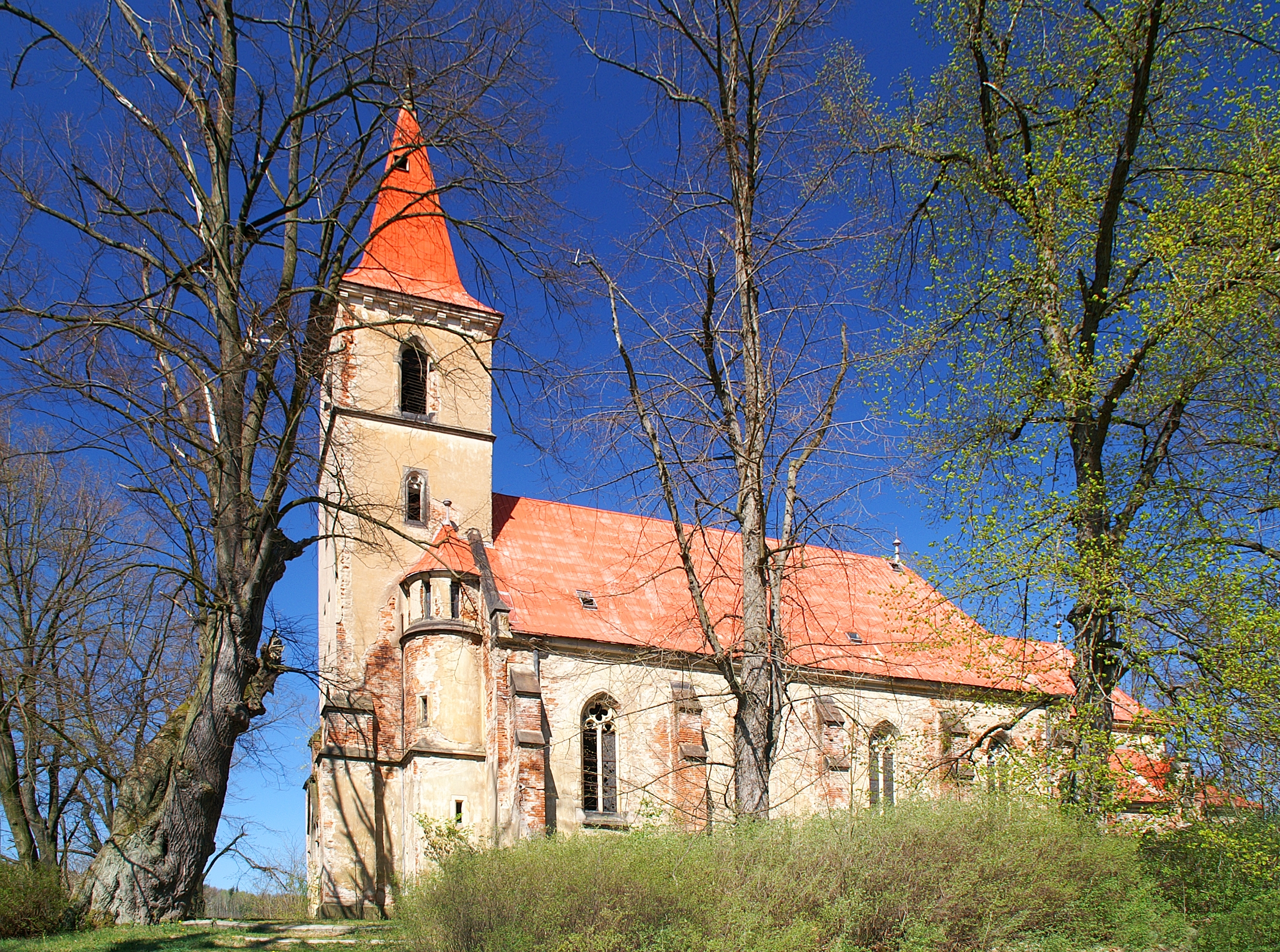 Kostel Nanebevzetí Panny Marie ve Velichově u Karlových Varů.